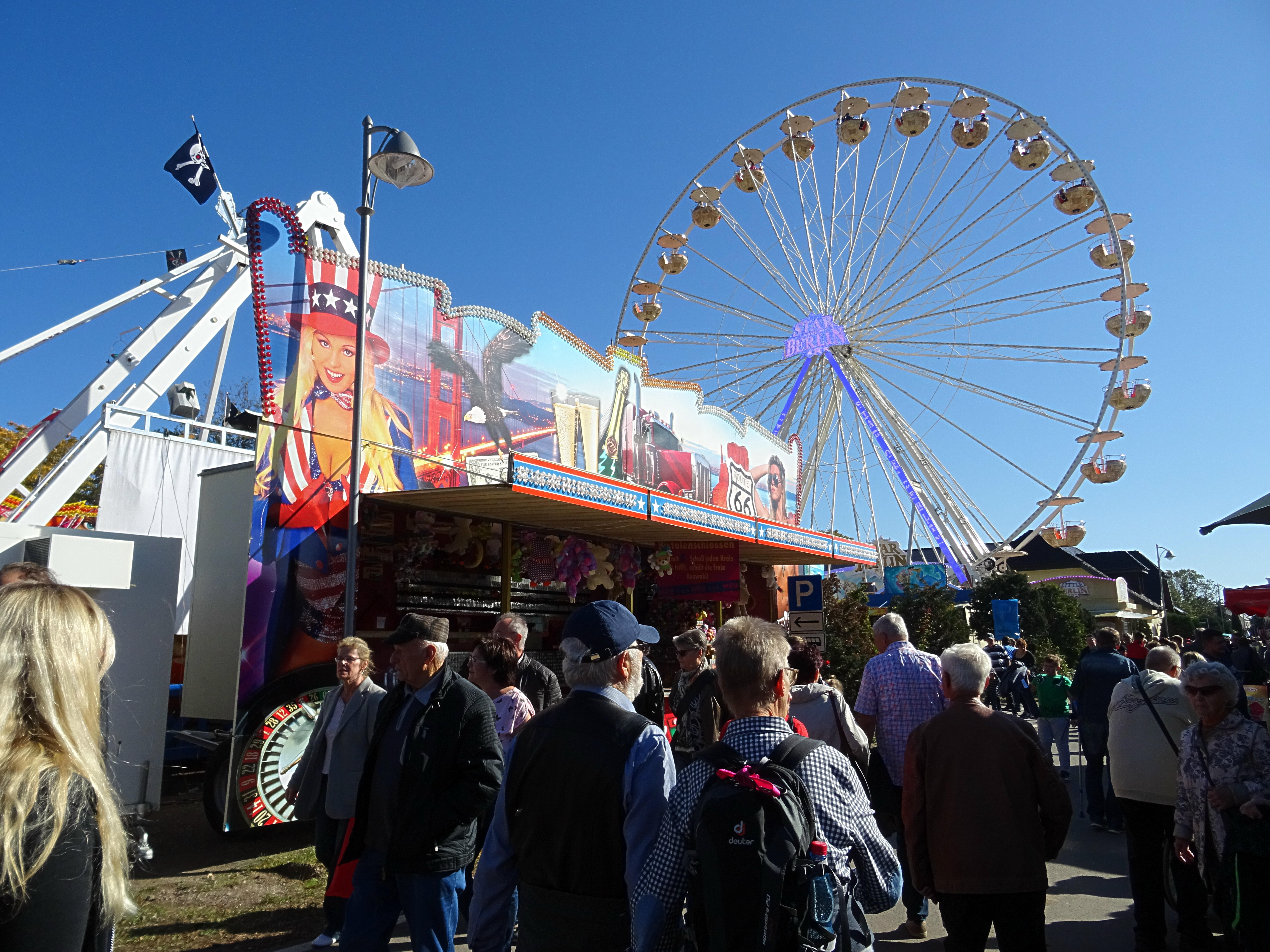 Horstseefischen: Seit 500 Jahren sind Zuchtfische aus Wermsdorf begehrt. Beim 50. Fischerfest vom 11. bis 13. Oktober 2019 wird das Abfischen aus dem 70 Hektar großen Horstsee traditionell gefeiert.